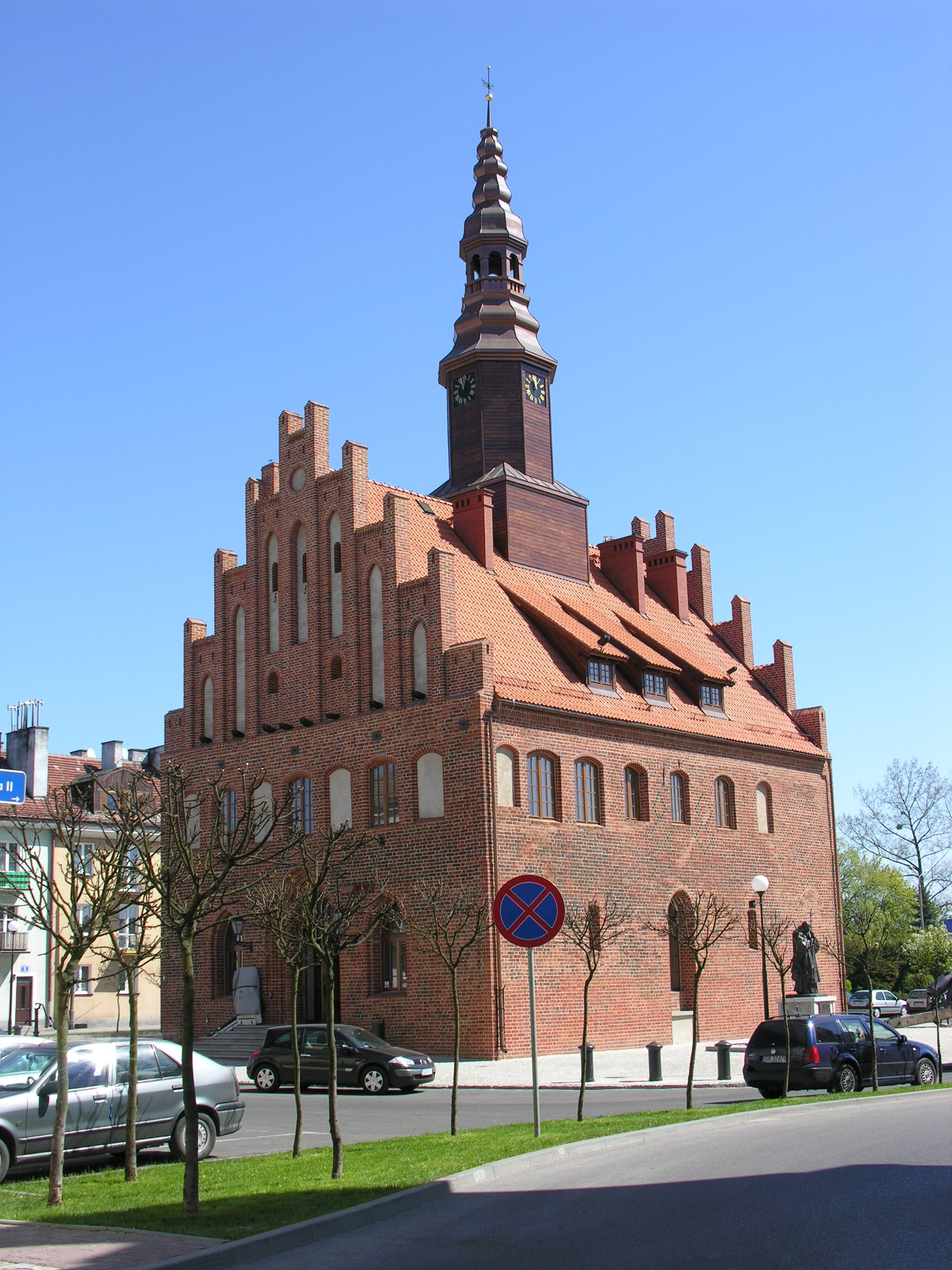 Morąg, ratusz, XV, kon. XVII